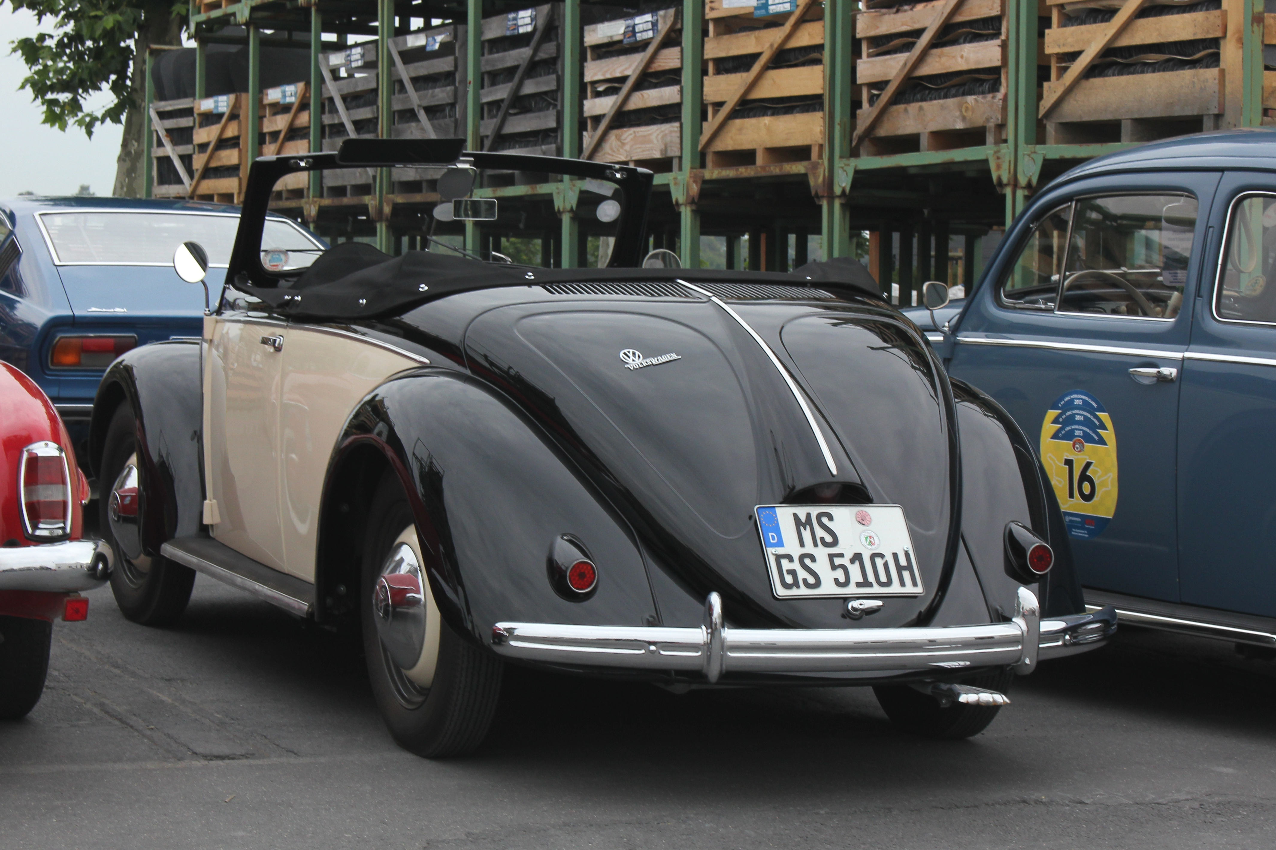 VW Typ 1, Cabriolet von Hebmüller, Baujahr 1951, Motor 1131 cm³, 25 PS; 696 Stück wurden gebaut. Das Fahrzeug ist wahrscheinlich eines der letzten, die nach dem Brand bei Hebmüller von Karmann zusammengebaut wurden. (Kennzeichen verändert)